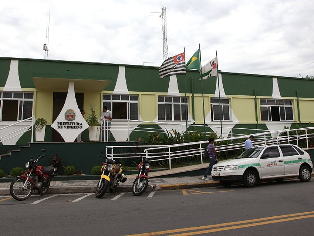 Sede da prefeitura municipal de Vinhedo.